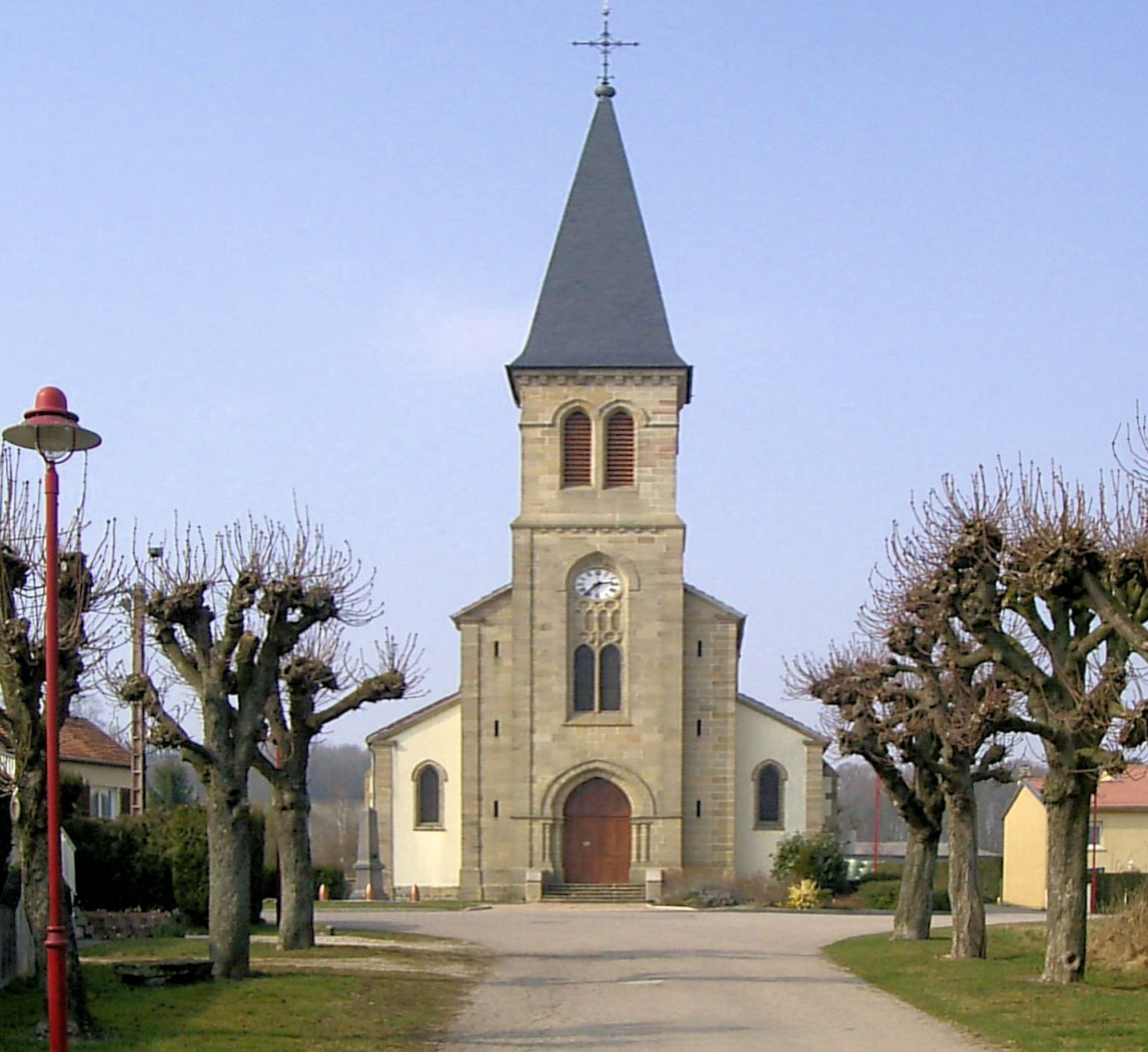 L'église Saint-Brice á Valleroy-aux-Saules